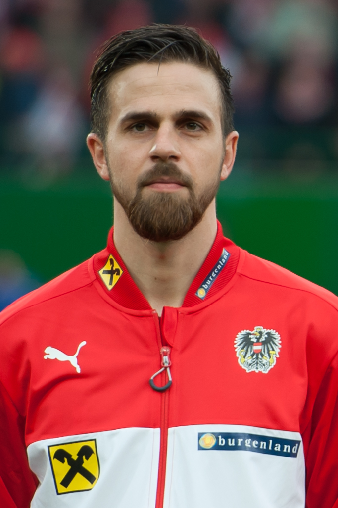 Wien, 26.03.2016, ÖFB Laenderspiel Oesterreich vs Albanien. Bild zeigt Martin Harnik (AUT).